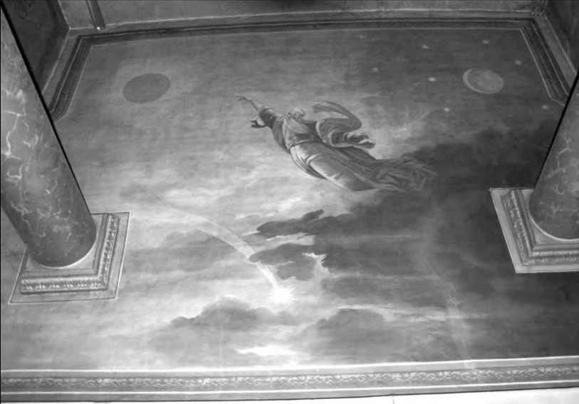 Dumnezeu creează soarele şi luna - Biserica Buna Vestire Câmpulung Muscel